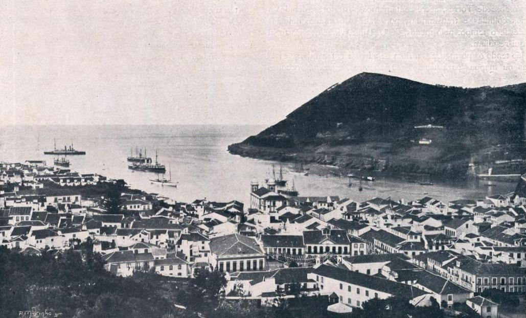 "Ilha Terceira - Porto e cidade de Angra do Heroísmo", in Álbum Açoriano, fascículo nº 40, 1903, p. 318.